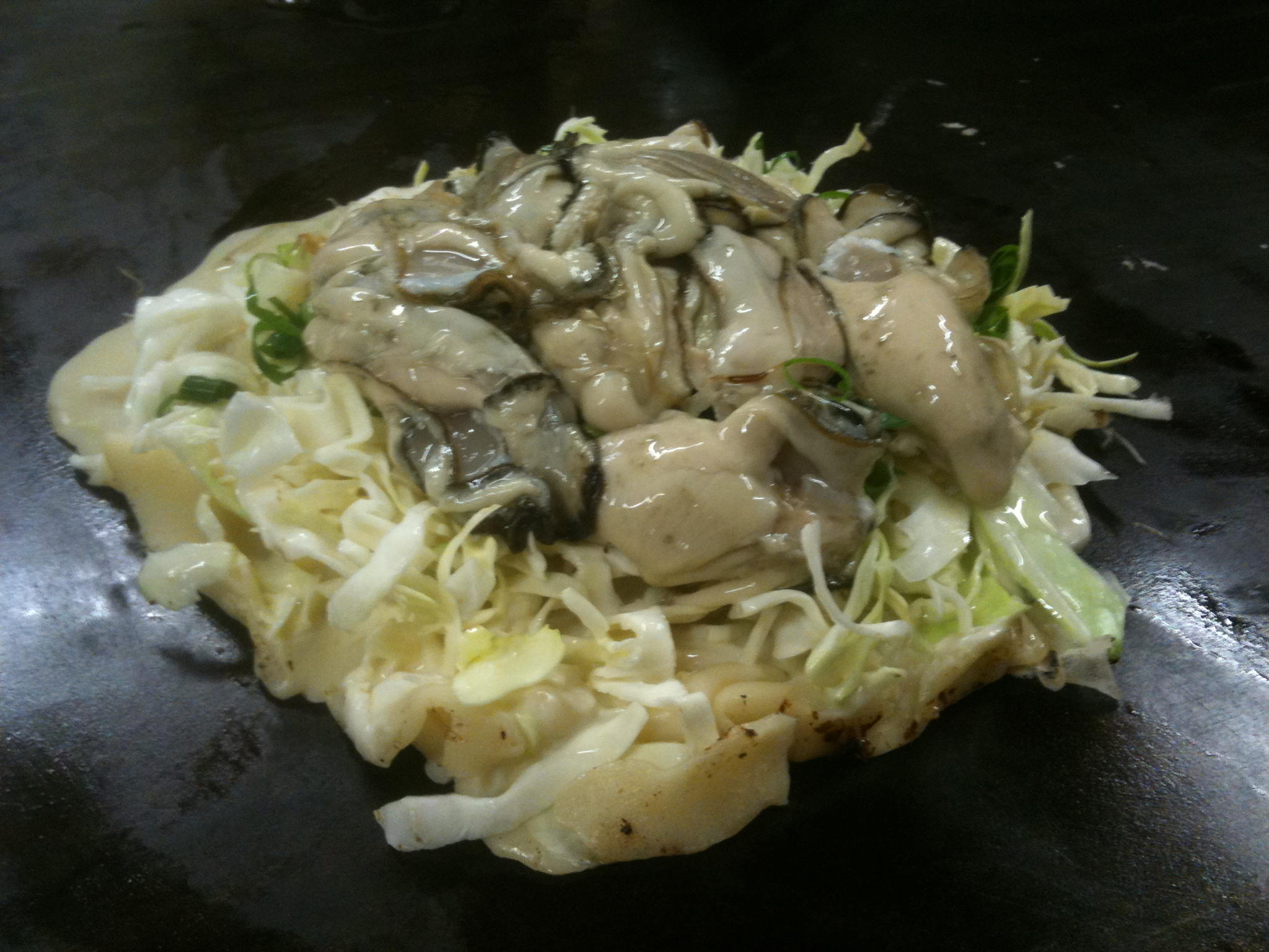 日生のカキオコ